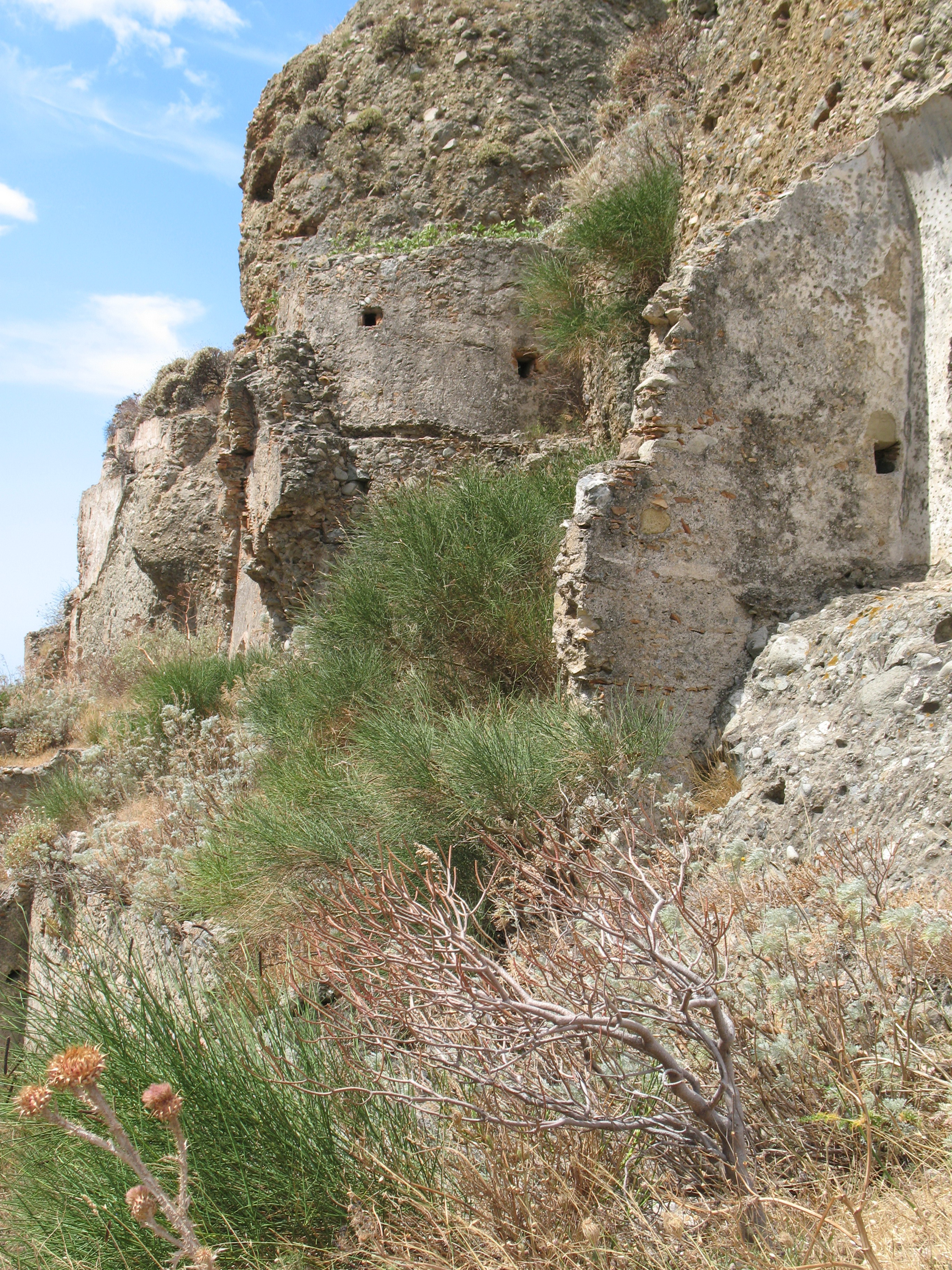 Pentedattilo, ruderi del castello